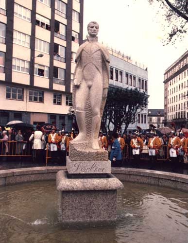 Estatua de Porlier en A Coruña